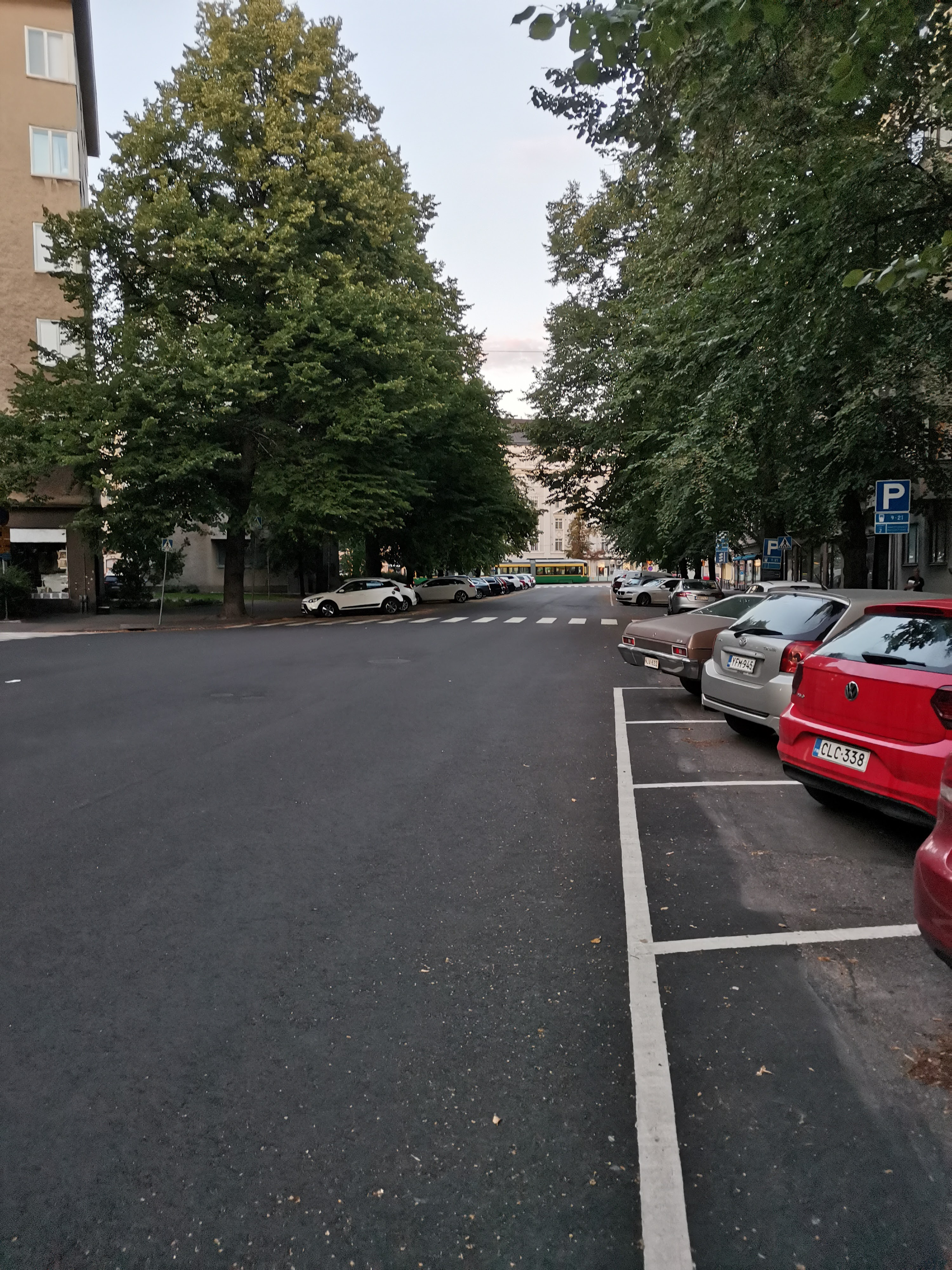 Linnankoskenkatu Minna Canthin kadun risteyksen kohdalla itään päin kuvattuna